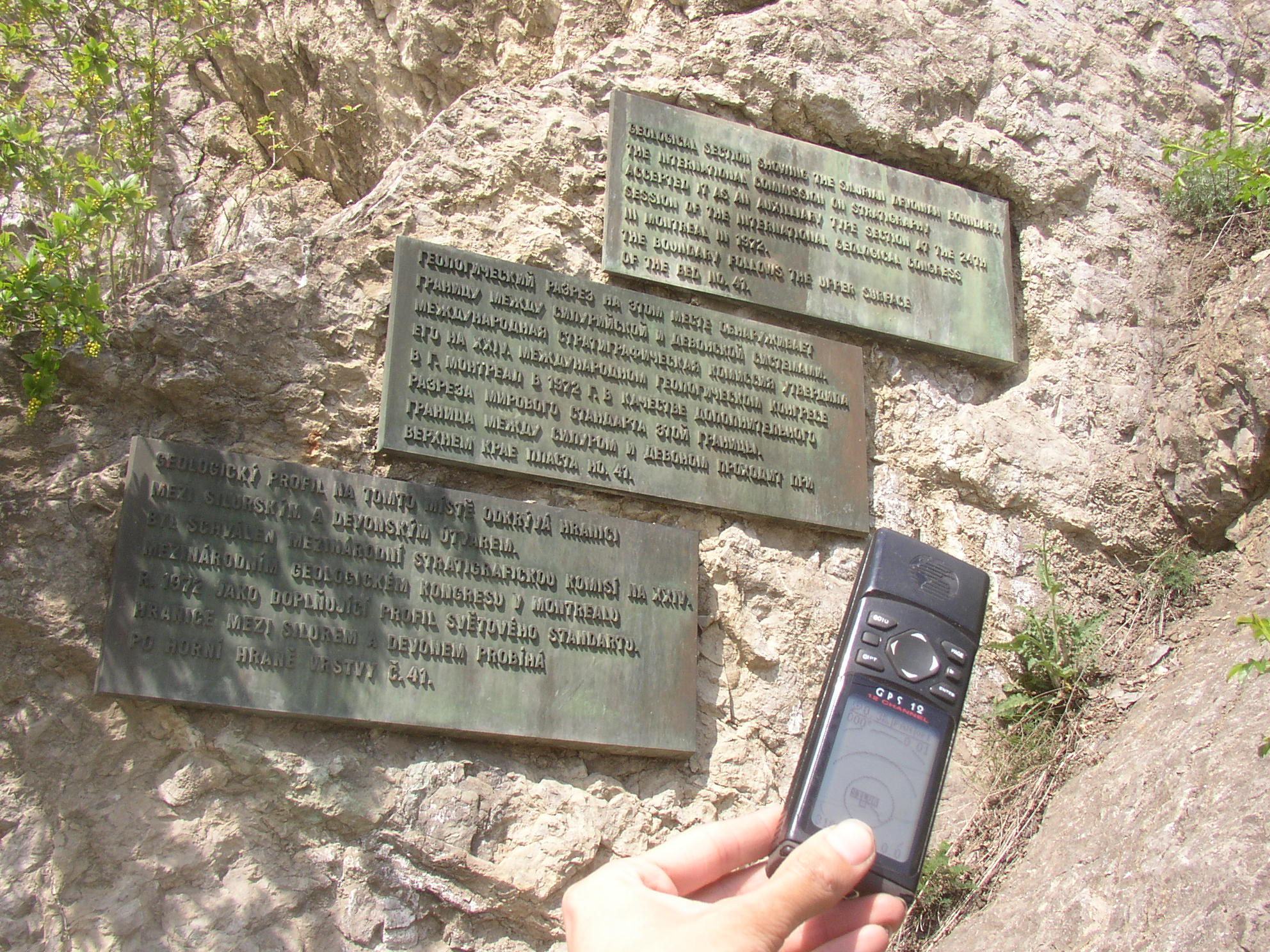 Pamětní deska na Budňanské skále v Karlštejně, připomínající pomocné mezinárodní geologické rozhraní silur-devon. vyfotografoval Miaow Miaow v dubnu 2005